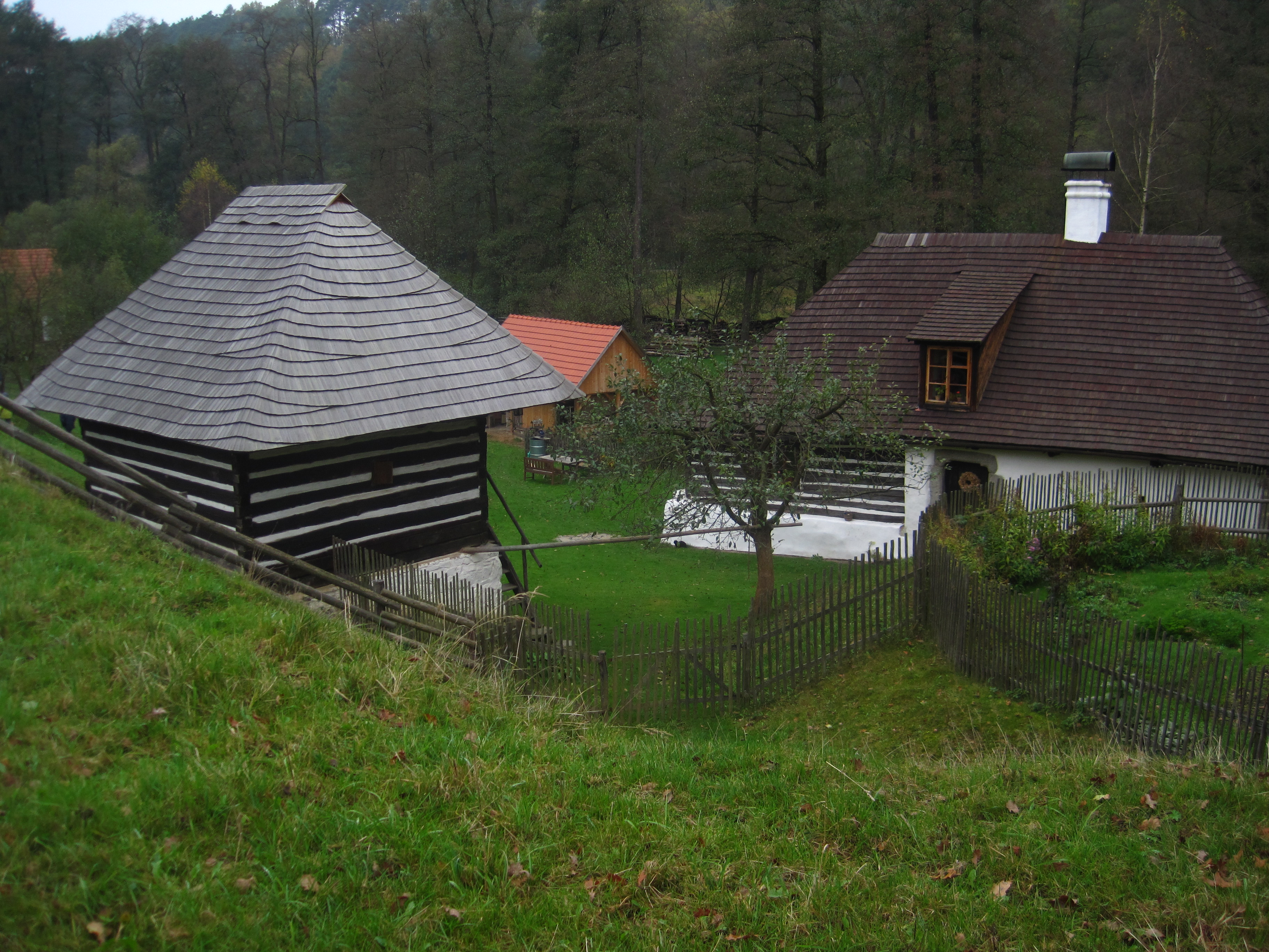 Vodní mlýn v dolní Bláhově Lhotě, Bláhova Lhota.